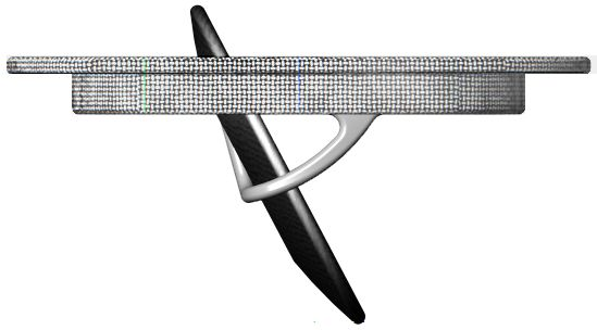 Эскиз митрального поворотно-дискового протеза клапана сердца